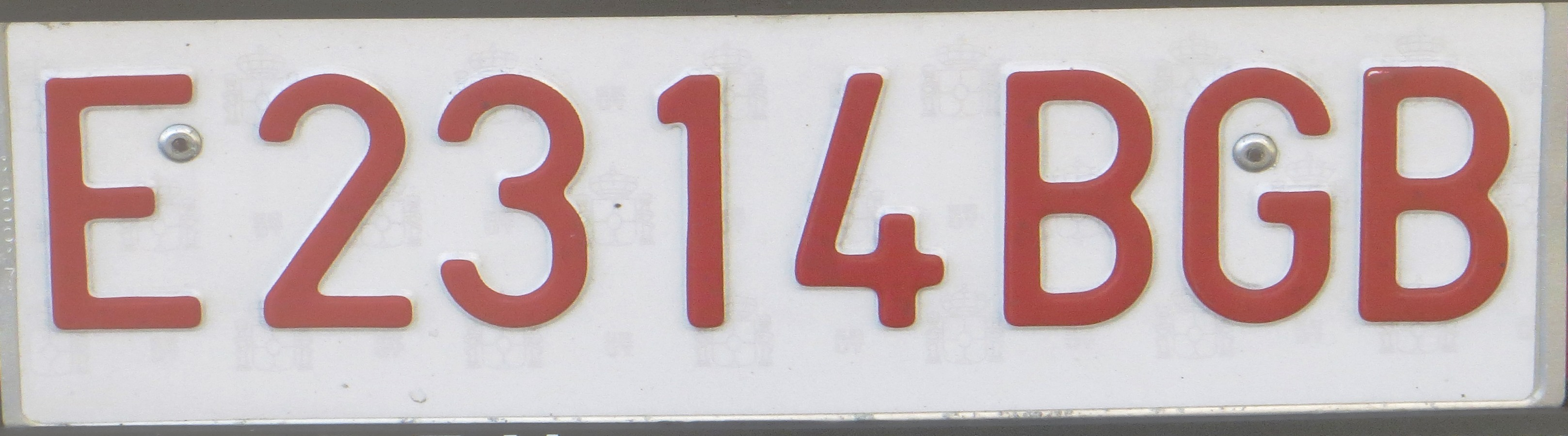 Spaan kentekenplaat voor langzame voertuigen